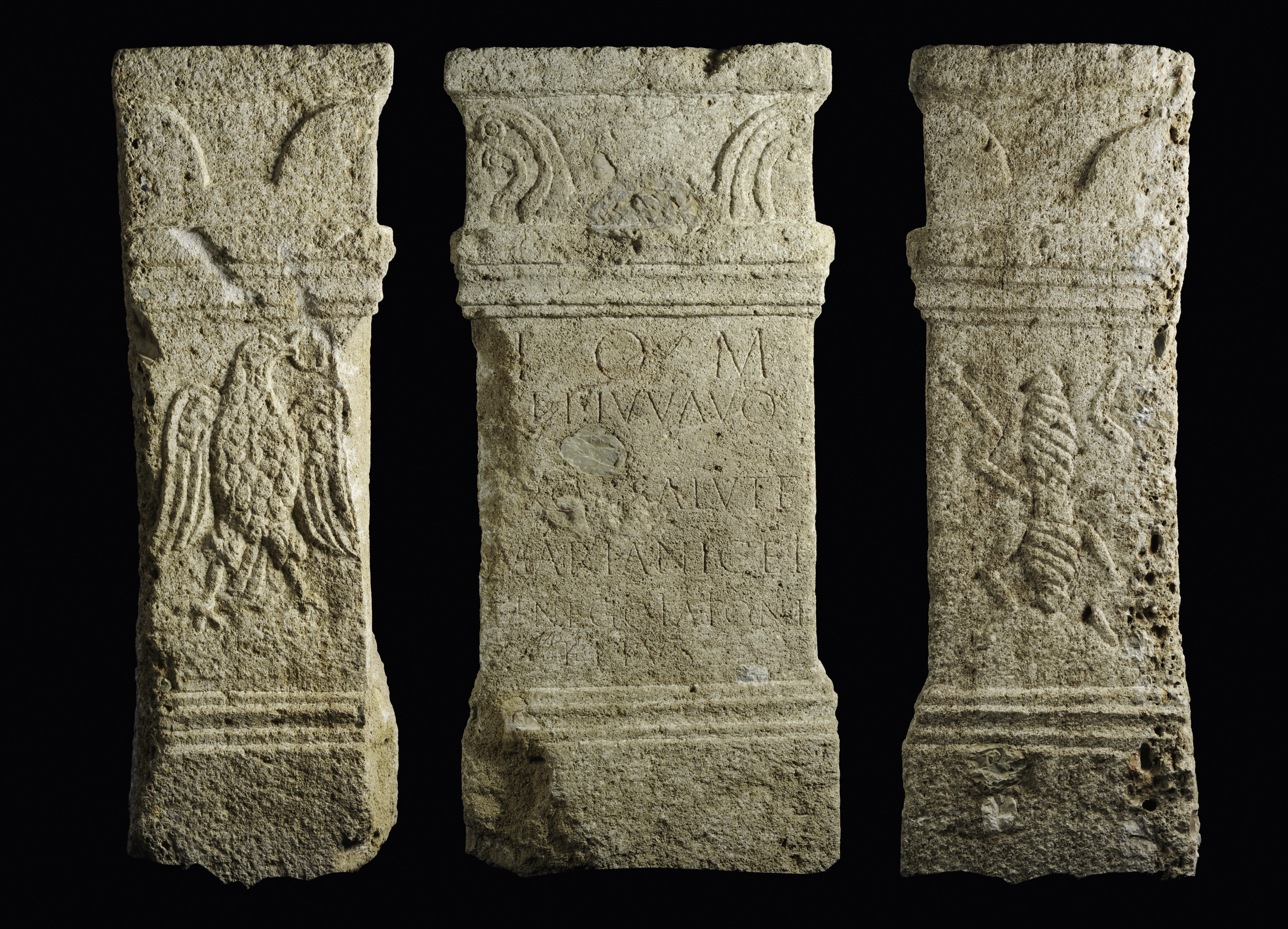 Weihestein, der 2008 auf dem Salzburger Residenzplatz gefunden wurde